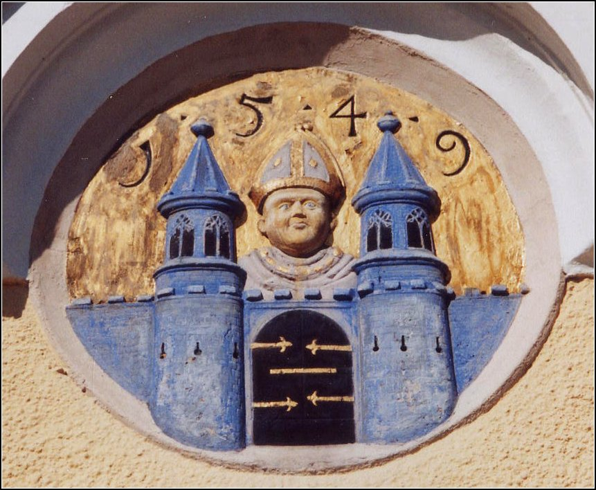 Stolpen: Stadtwappen über dem Eingang zum Rathaus.